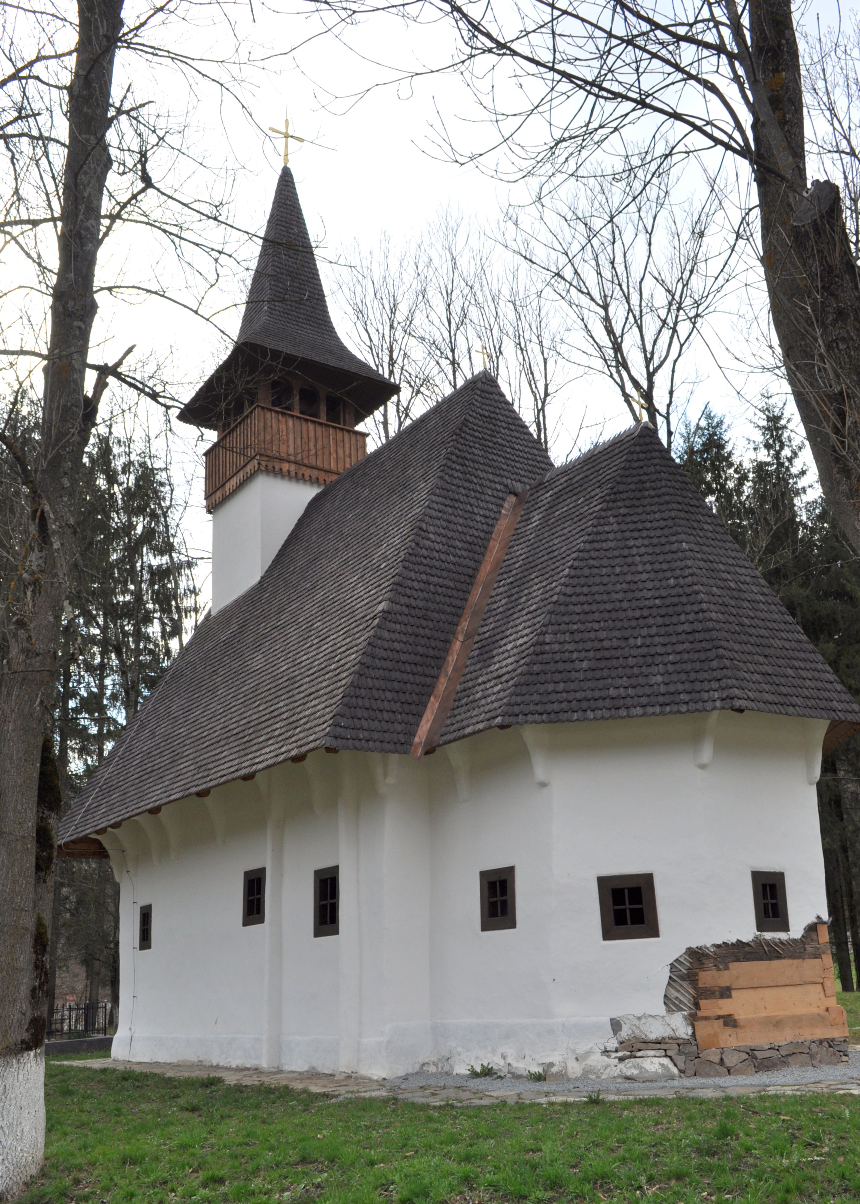 Biserica de lemn "Sf. Nicolae" a mănăstirii Lupşa, sat VALEA LUPŞII; comuna LUPŞA